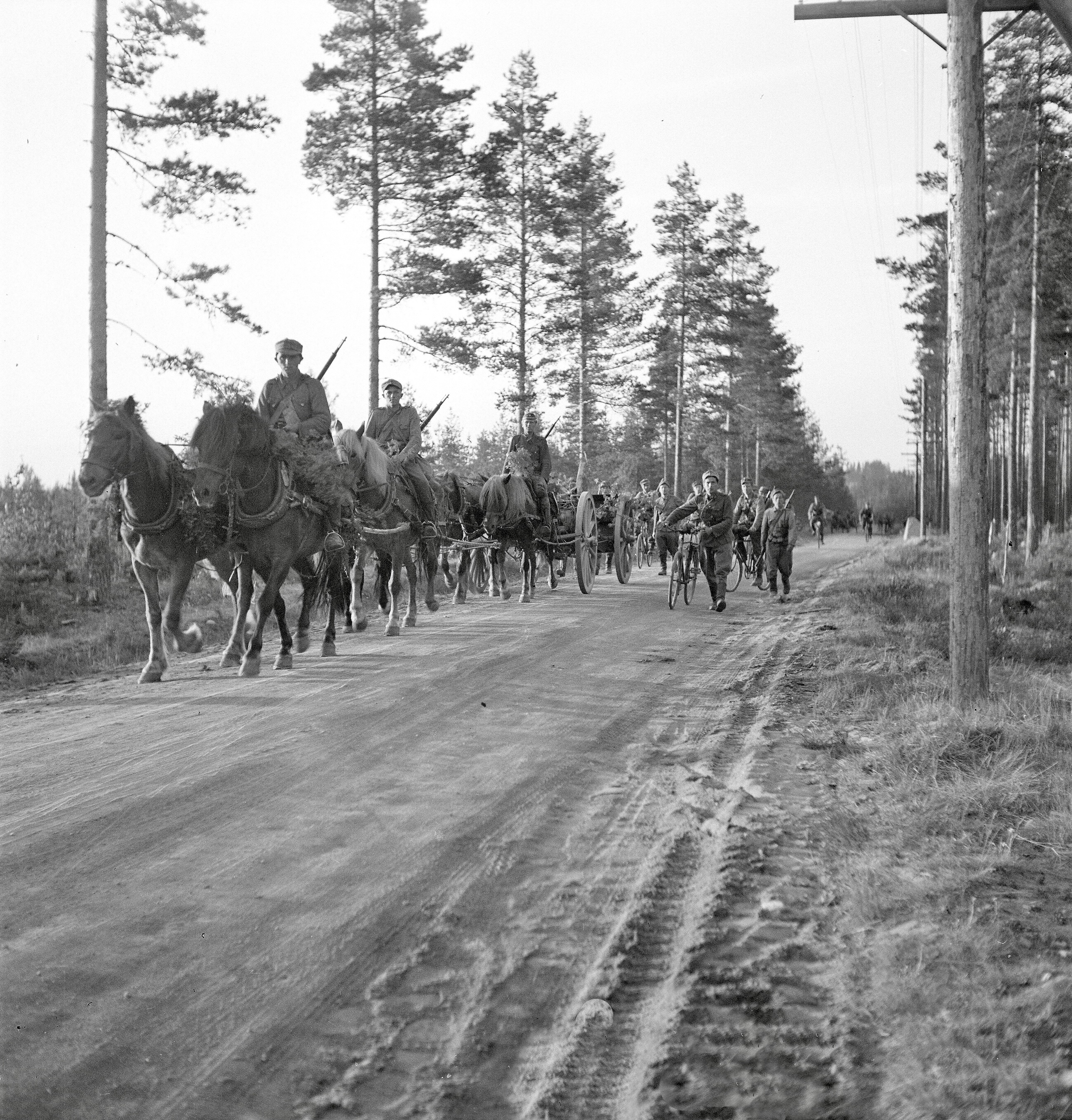 Артиллерия и пехота из состава бронетанковой дивизии генерала Р. Лагуса следуют для участия в контрнаступлении под Куутерселькя. Район Лийколы, 14 июня 1944 г.